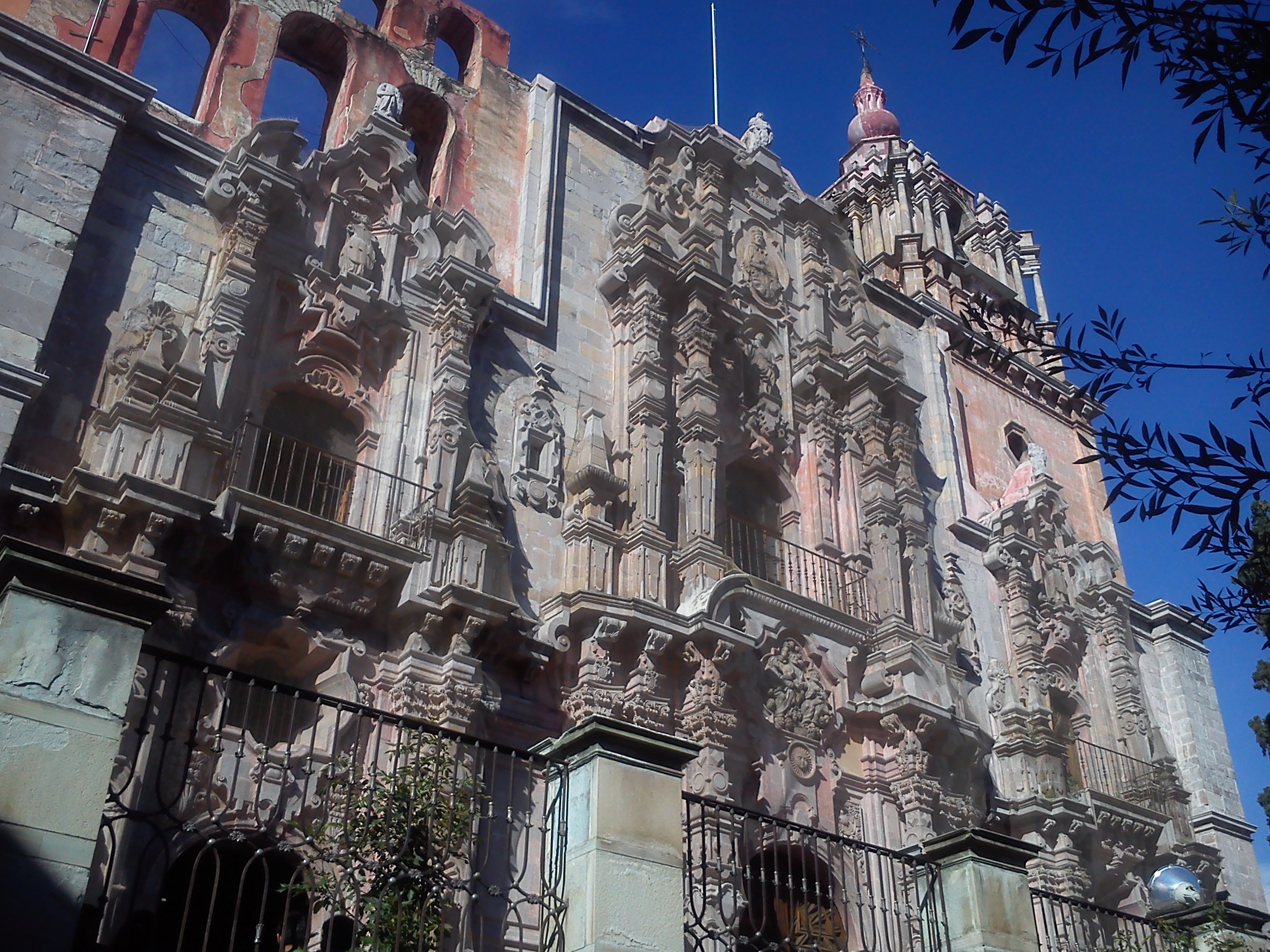 Templo de la Compañía de Jesús